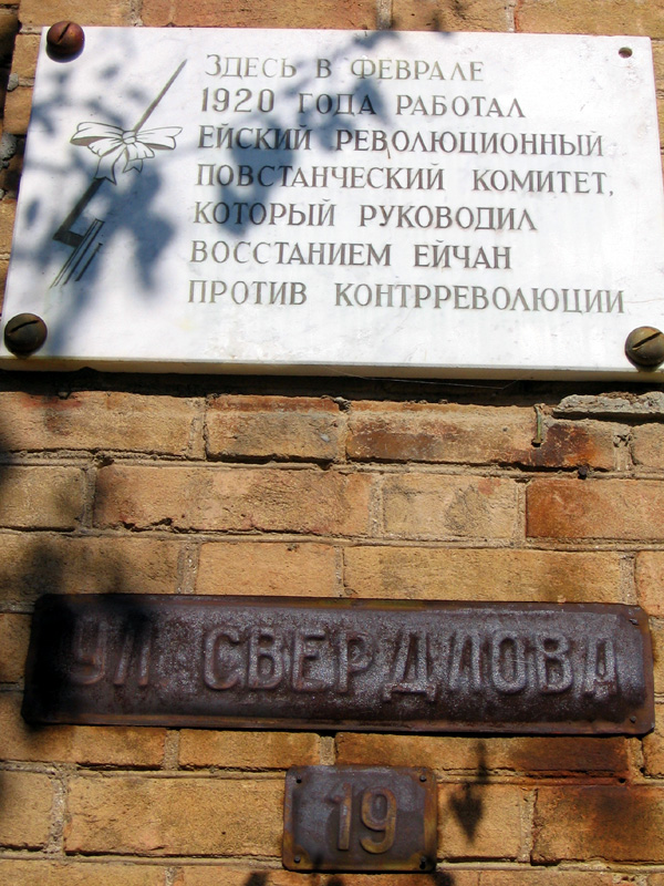 Памятный знак на здании школы №5 города Ейска